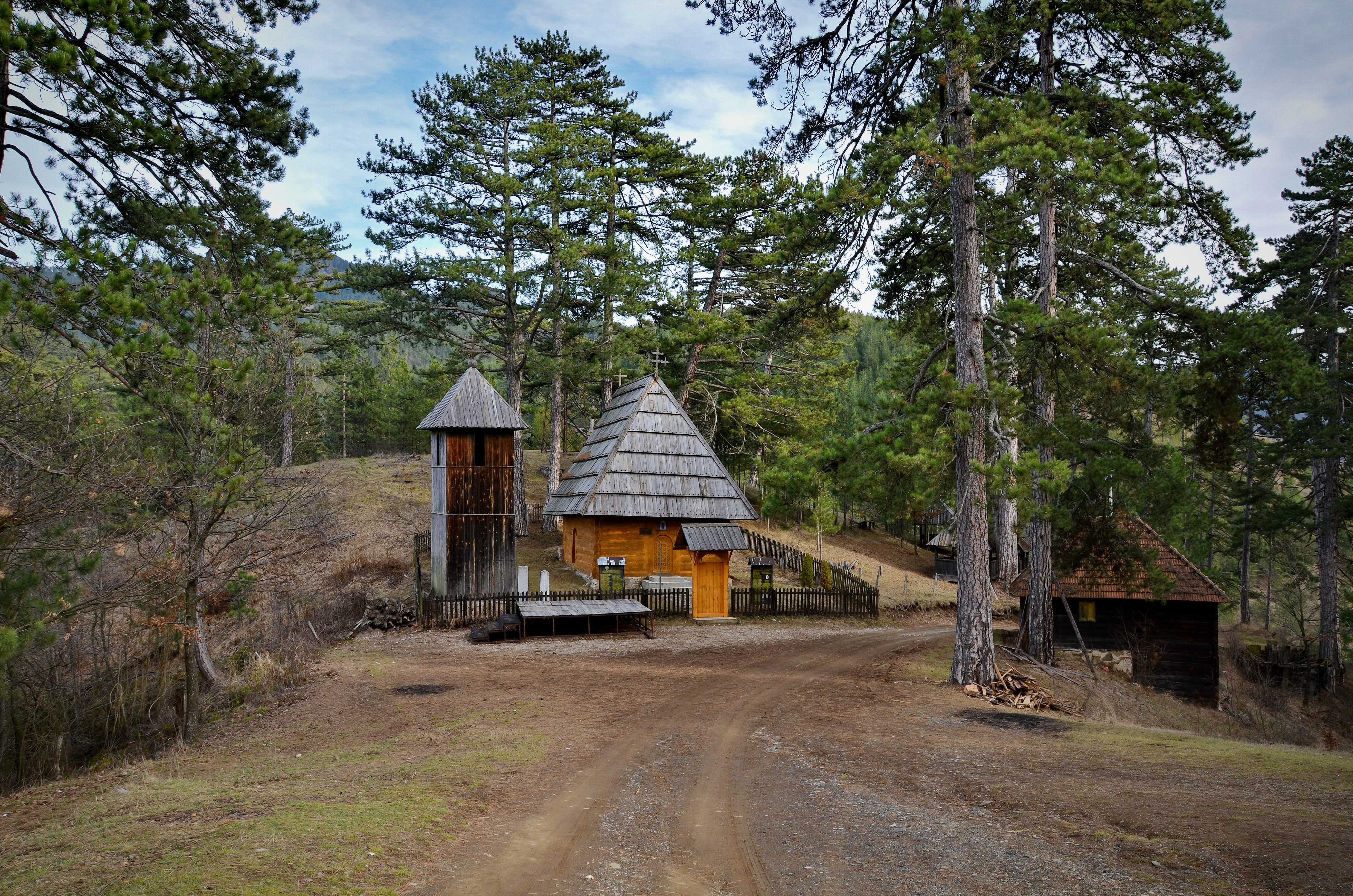 Црква брвнара са старим гробљем и собрашицама у Доњој Јабланици, општина Чајетина, подигнута је 1838. године, посвећена Богородичином Покрову. Налази се на списку културних добара од великог значаја.